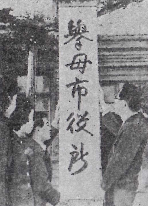 西加茂郡挙母町が1951年に市制施行して挙母市（現・豊田市）になった際の挙母市役所。